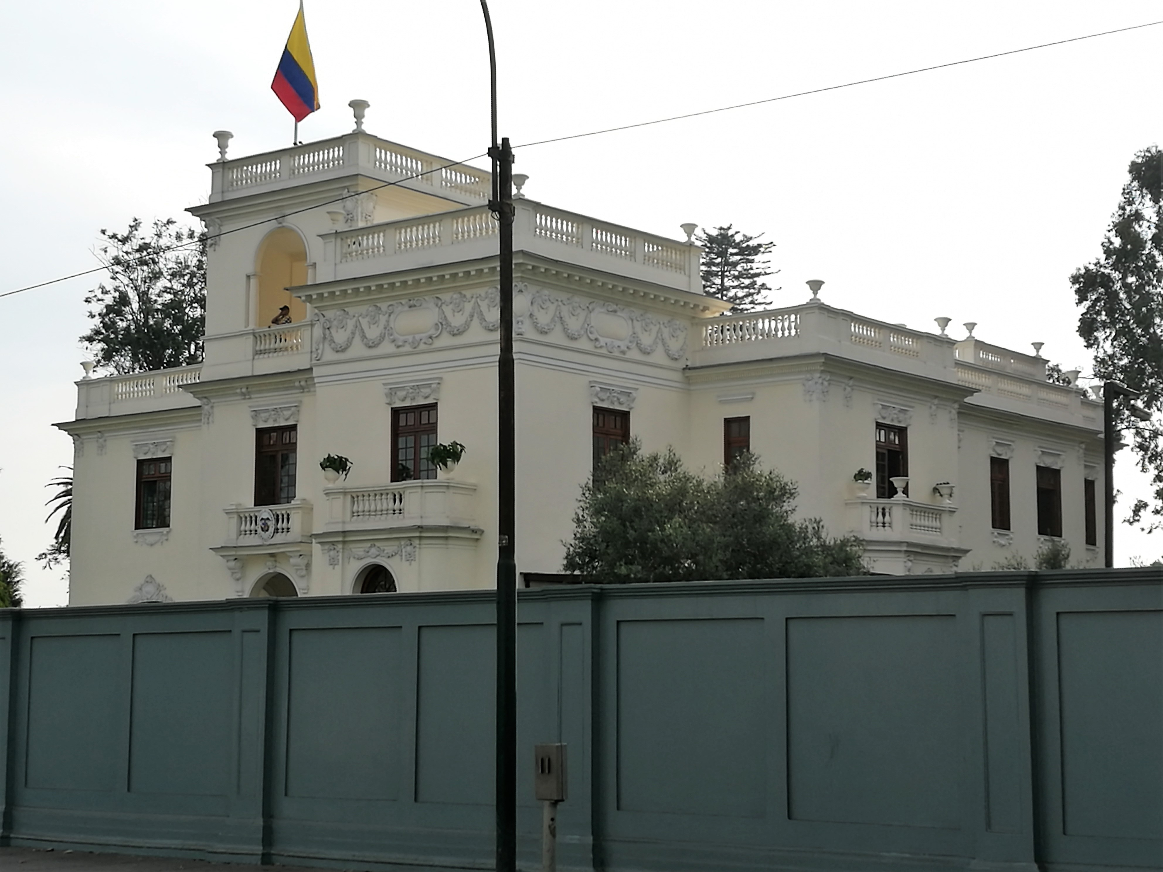 Residència de l'Ambaixada de Colòmbia a la confluència de l'Avenida Arequipa amb el Carrer Juan de Arona, a San Isidro, Lima